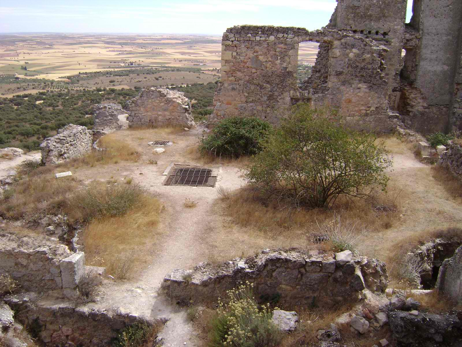 Vista del patio desde lo que serían las habitaciones